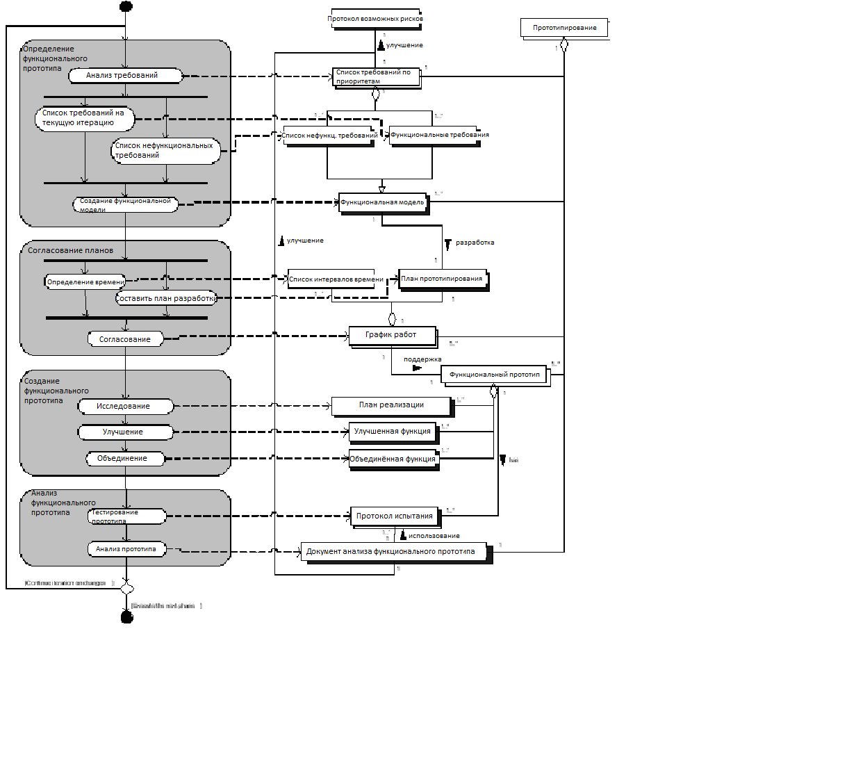 Модель развития процесса DSDM